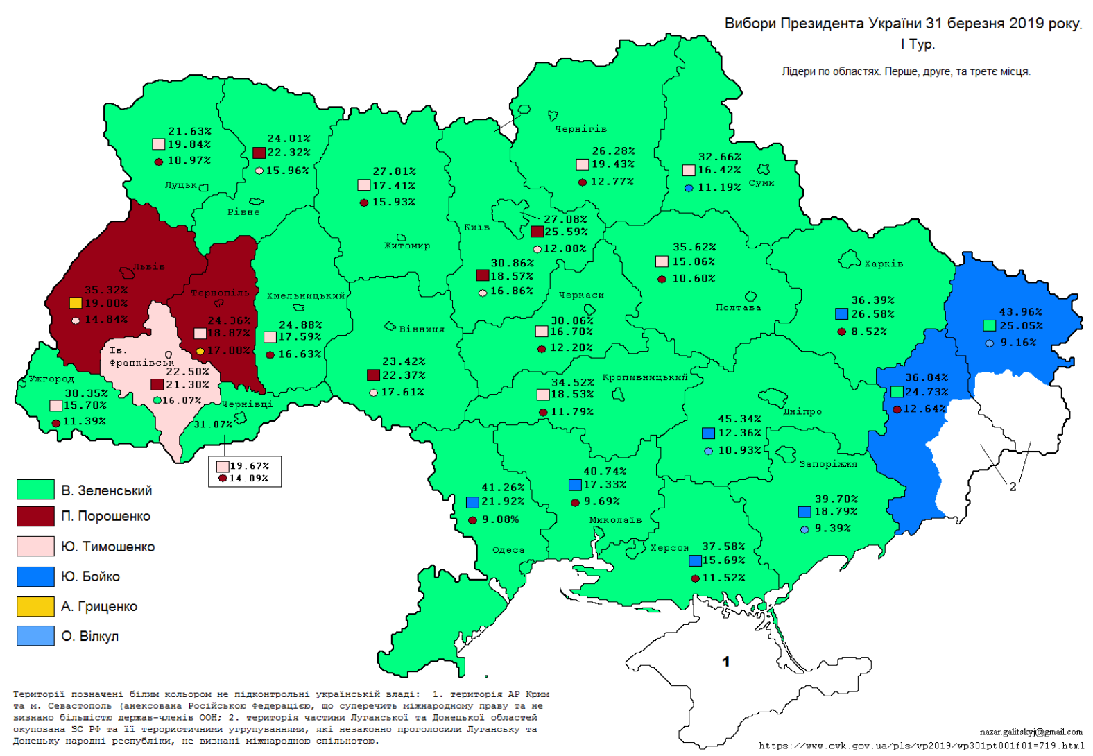 Вибори Президента України 2019 (І тур). Лідери по областях.